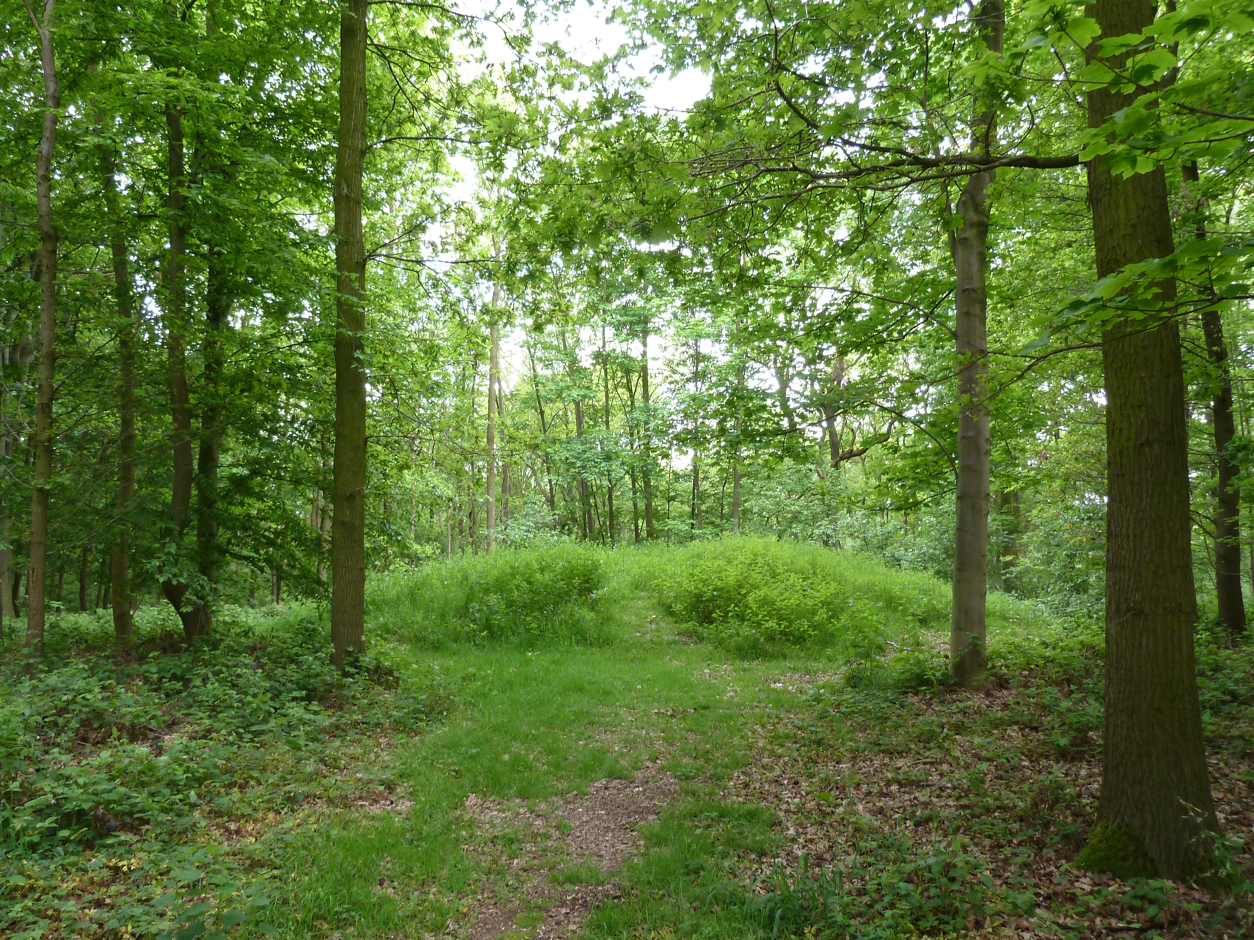 grafheuvel Savelsbos, Gronsveld, Nederland